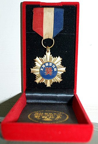 中華民國內政部頒給抗日愛國烈士方幼祥的褒揚令奬章。